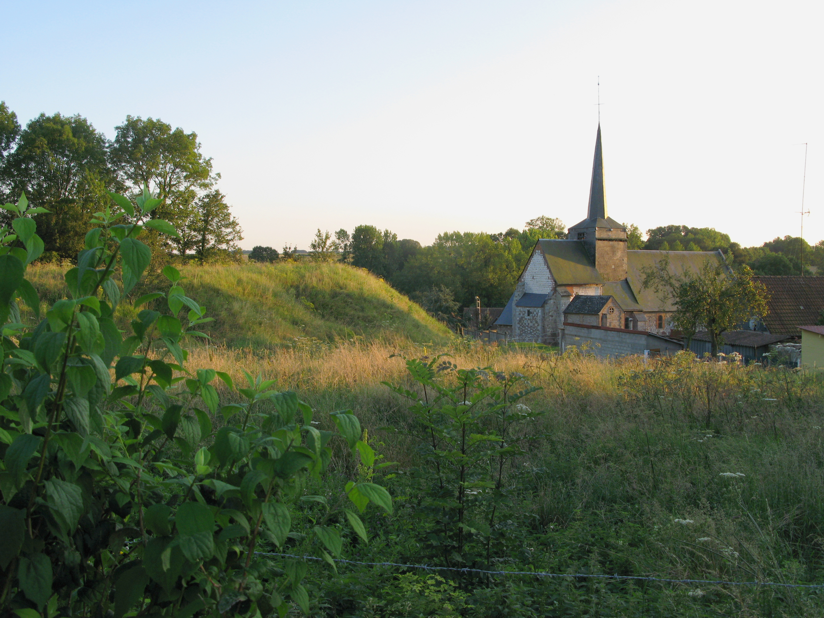 Maisnières (Somme, France) - La motte féodale et l'église vues sous le soleil couchant.